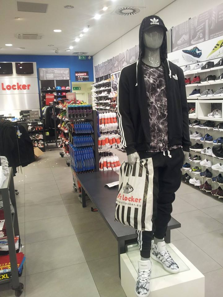 foto prodejny na chodově z roku 2014. Na obrázku je figurína i nákupní taška.